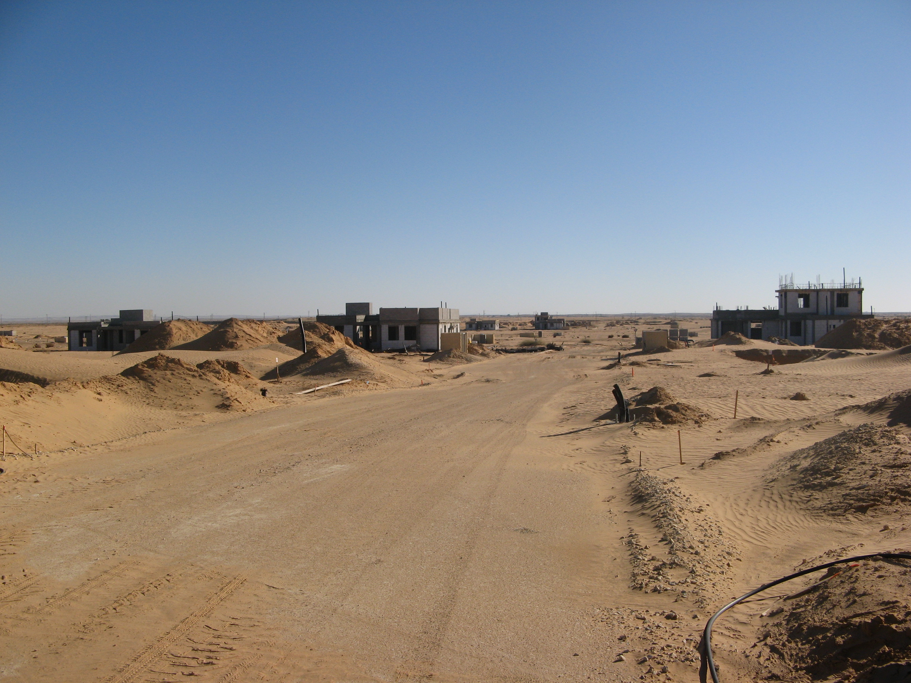 Nave